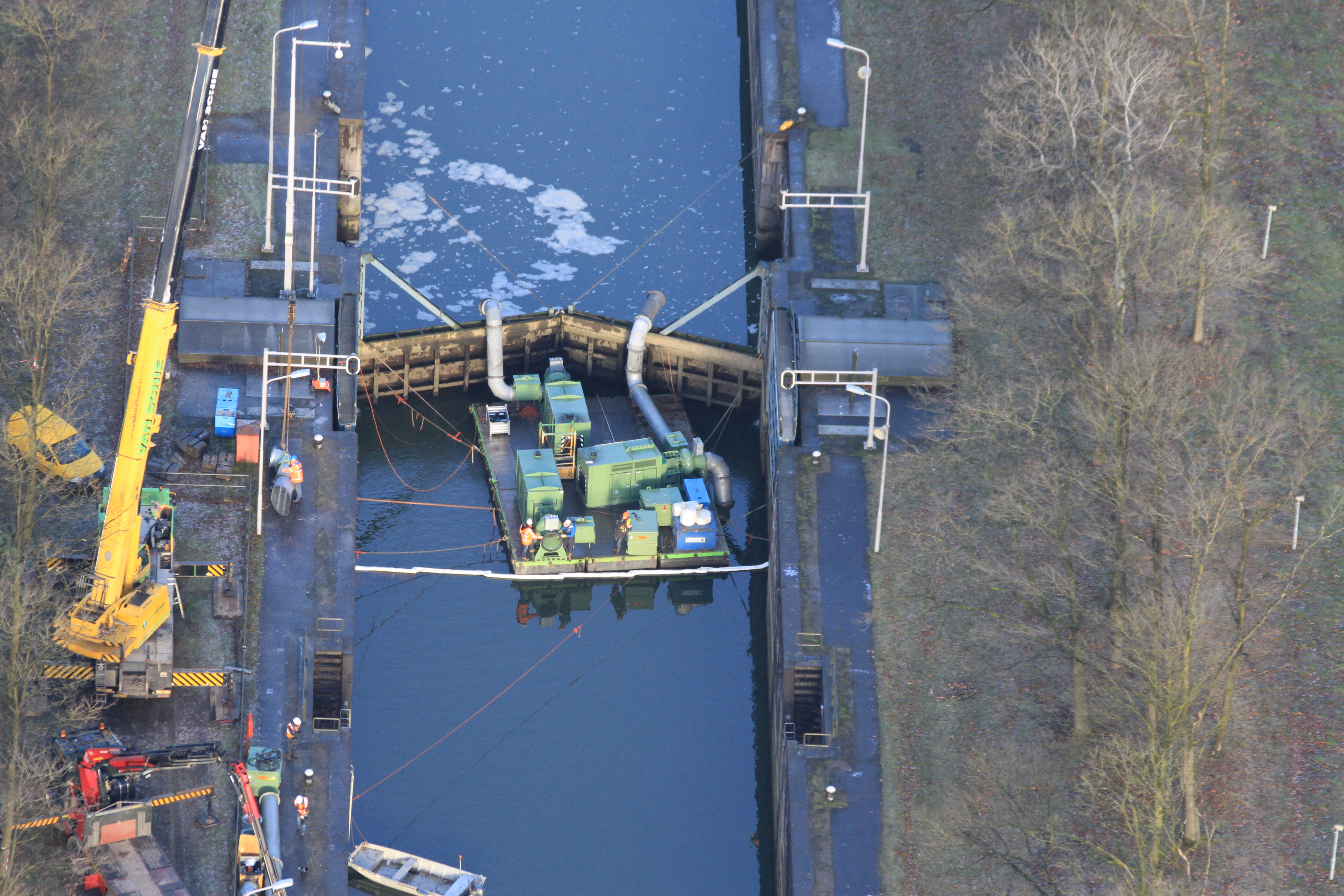 Sluiscomplex Heumen